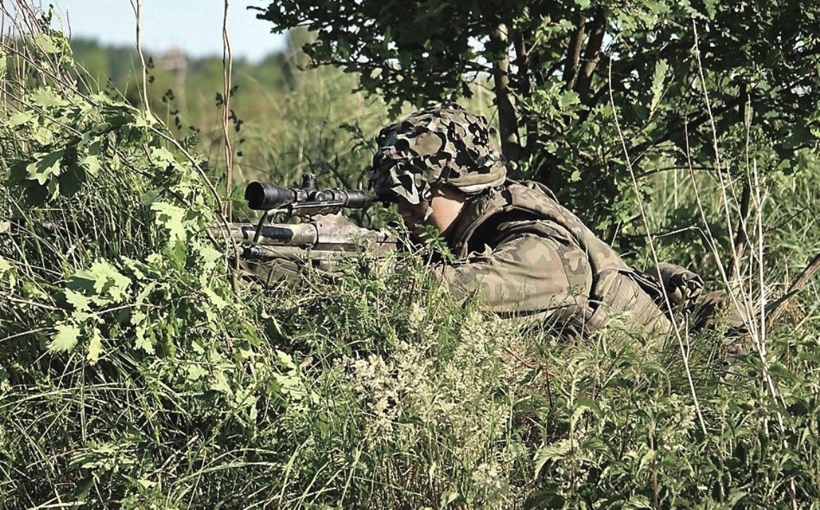 Żołnierz z 2bzmot podczas szkolenia poligonowego